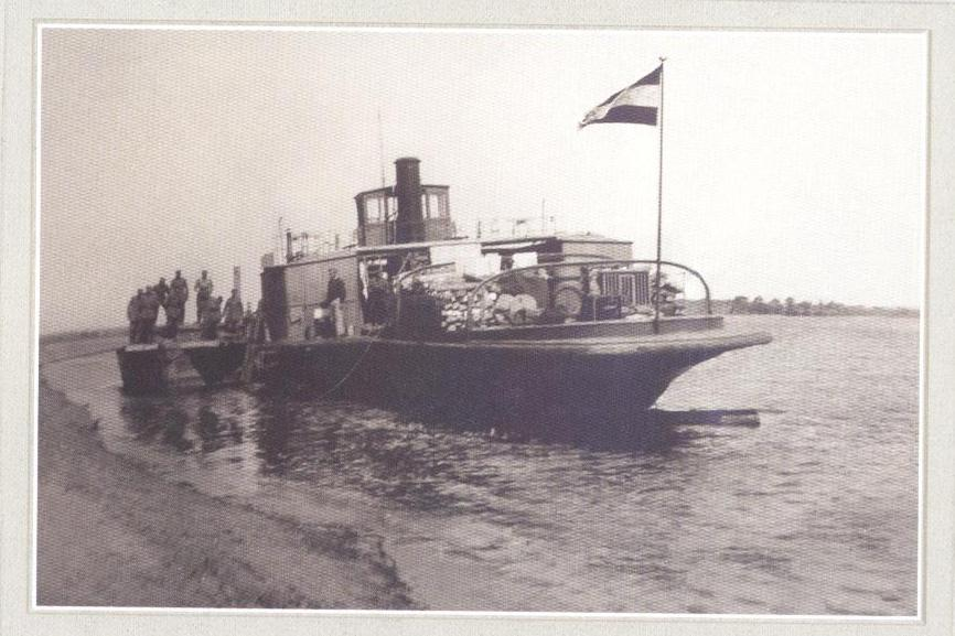 Беларуская (тарашкевіца): Холмеч (Chołmieč), рака Дняпро (Dniapro)